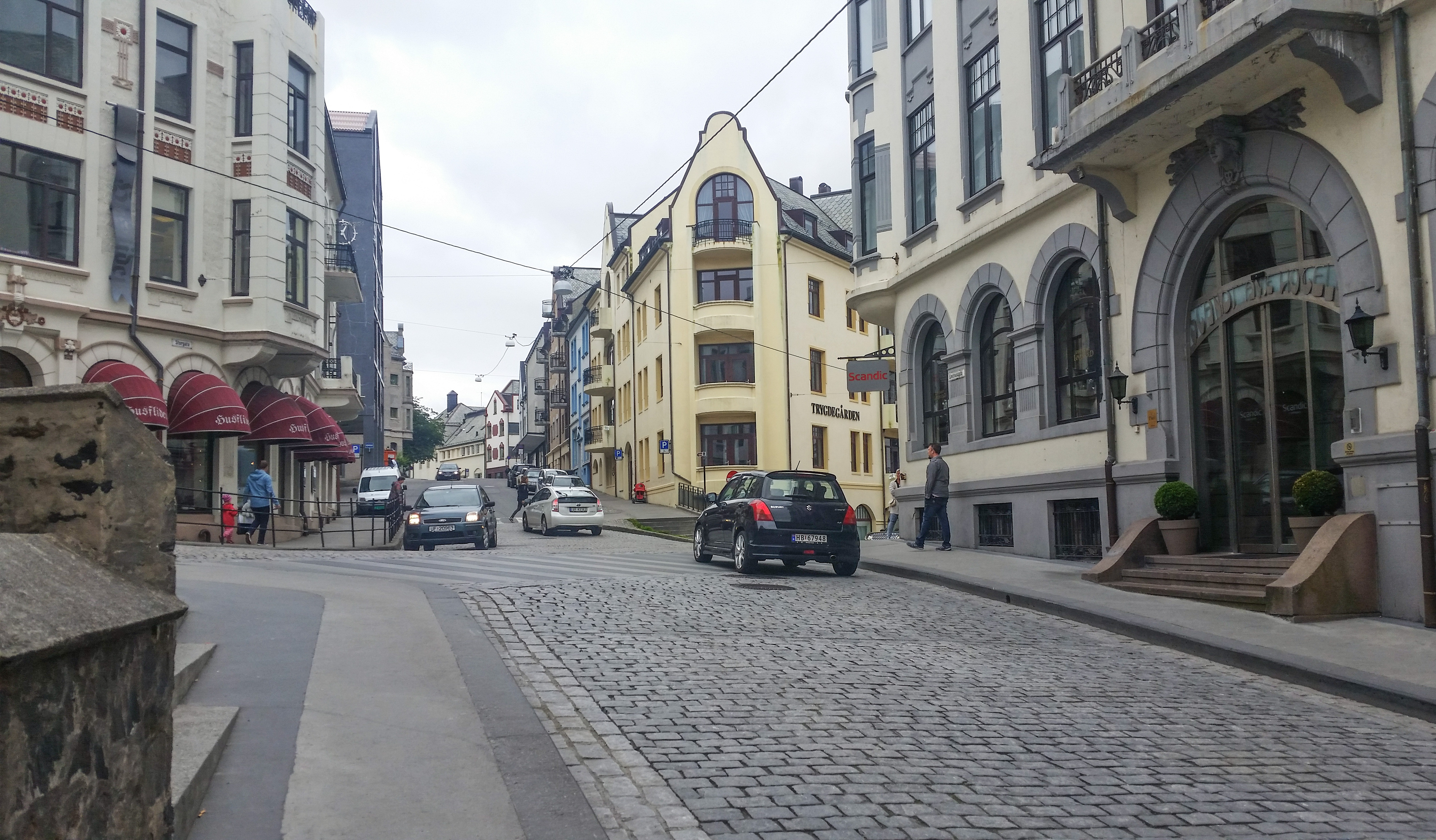 Fylkesvei 394 Løvenvoldgata Parkgata krysser Storgata i Ålesund sentrum